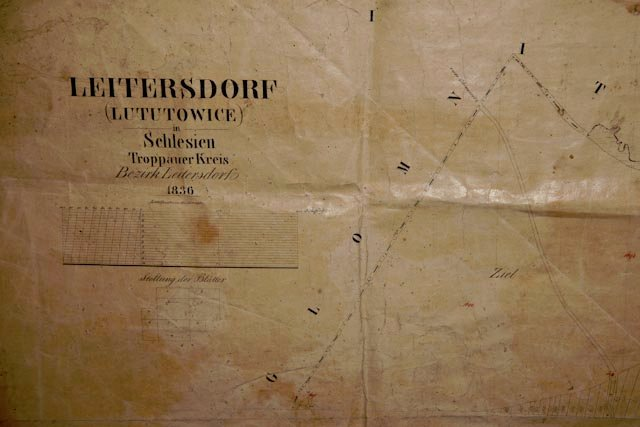 Alter Plan von Schloss Leitersdorf 1836 (Ausschnitt), Foto von Fam. Mayerh. 2010